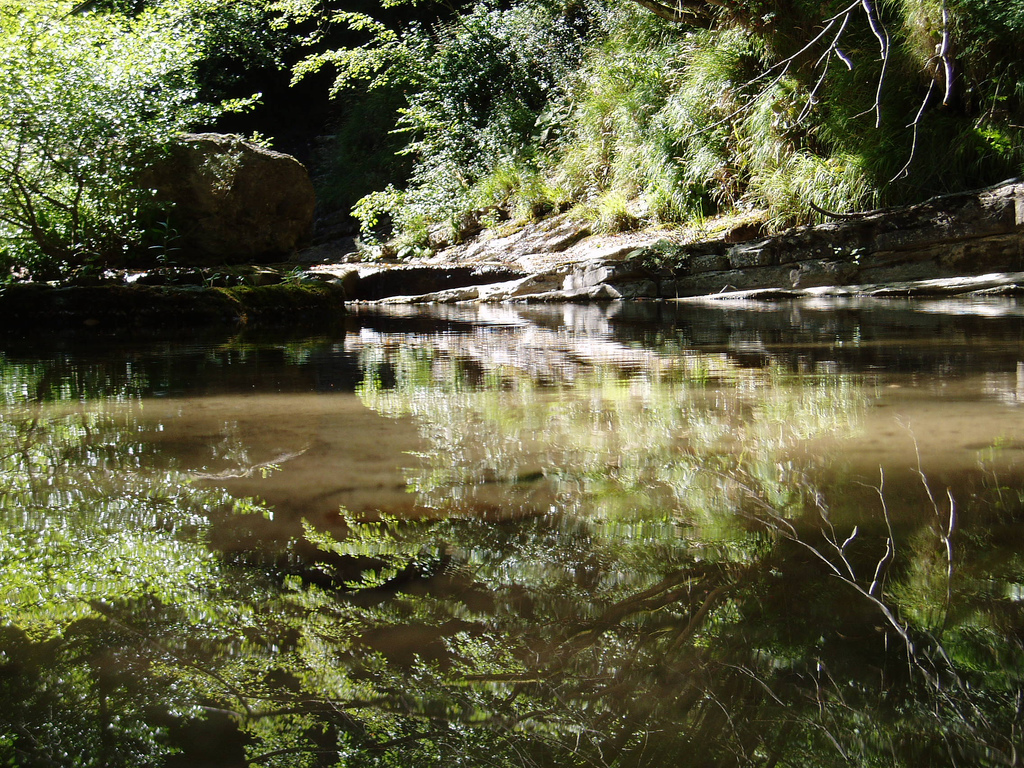 torrente acquacheta nei pressi di san benedetto in alpe (FC, Italia)